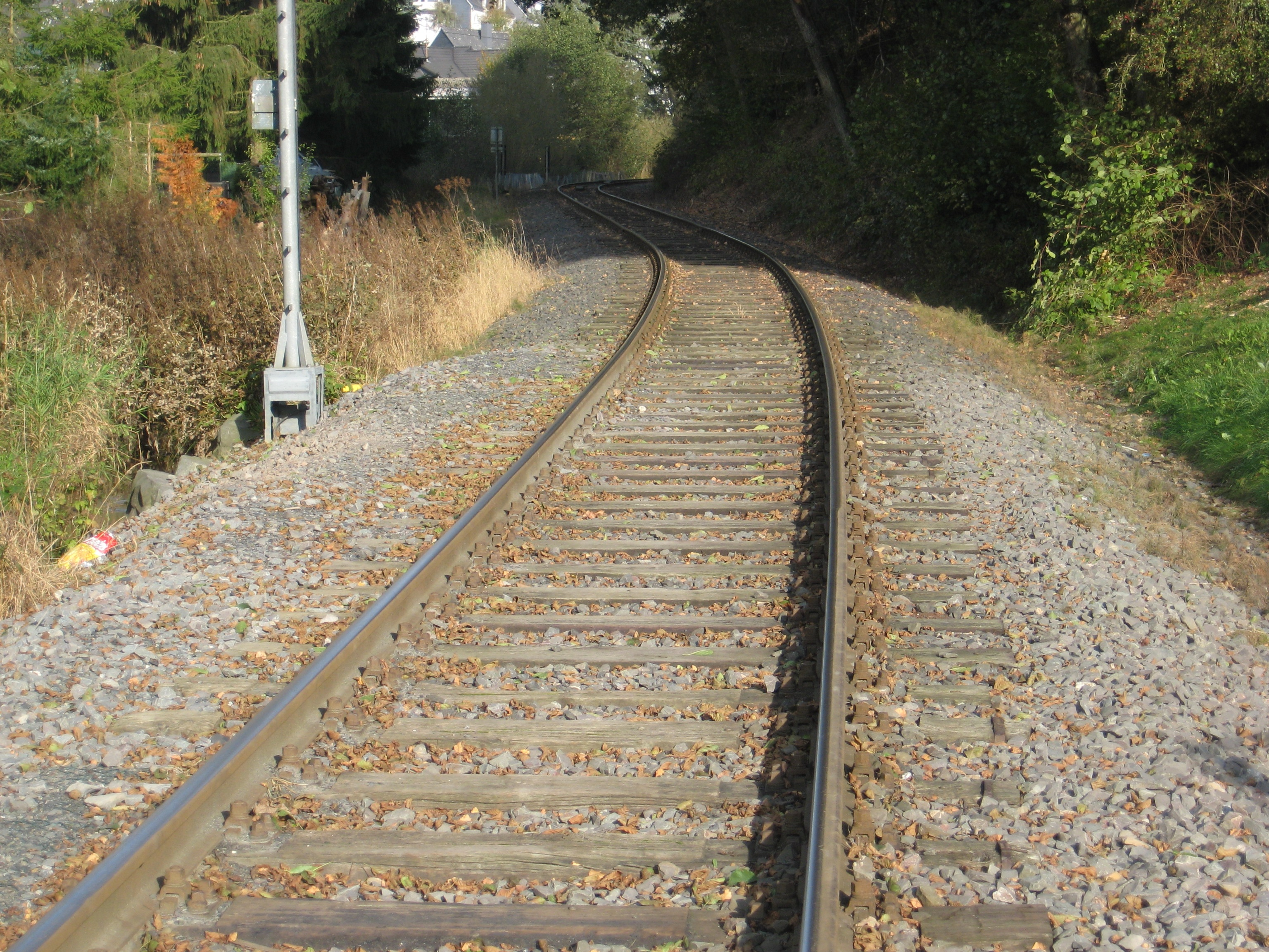 Gleise der ehemaligen Freien Grunder Eisenbahn, die heute zur Kreisbahn Siegen gehören und zu den Schäfer Werken am Gelände der ehemaligen Grube Pfannenberger Einigkeit führen.